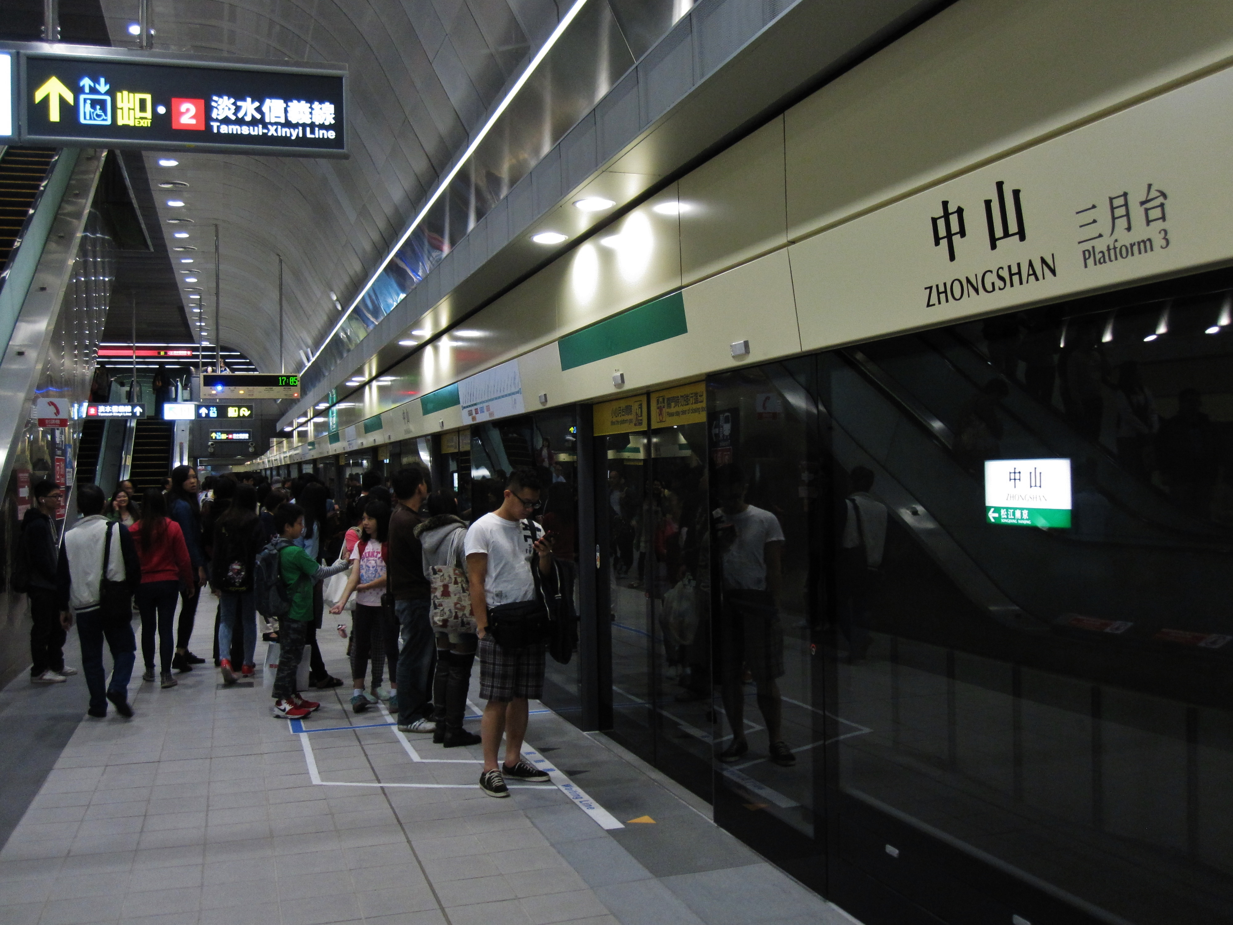 捷運松山線中山站三月台